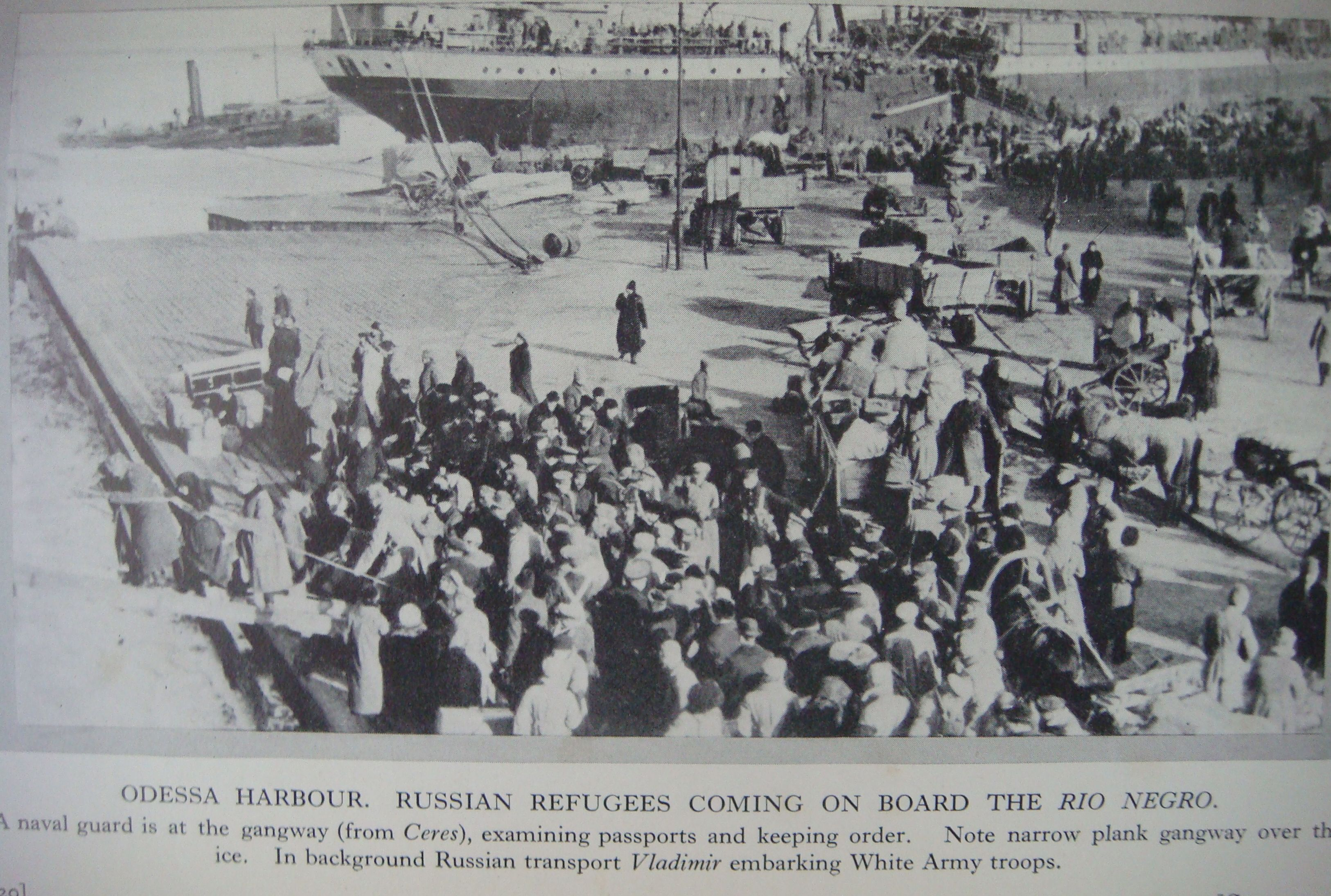 Сцены одесской эвакуации. Февраль 1920 г.